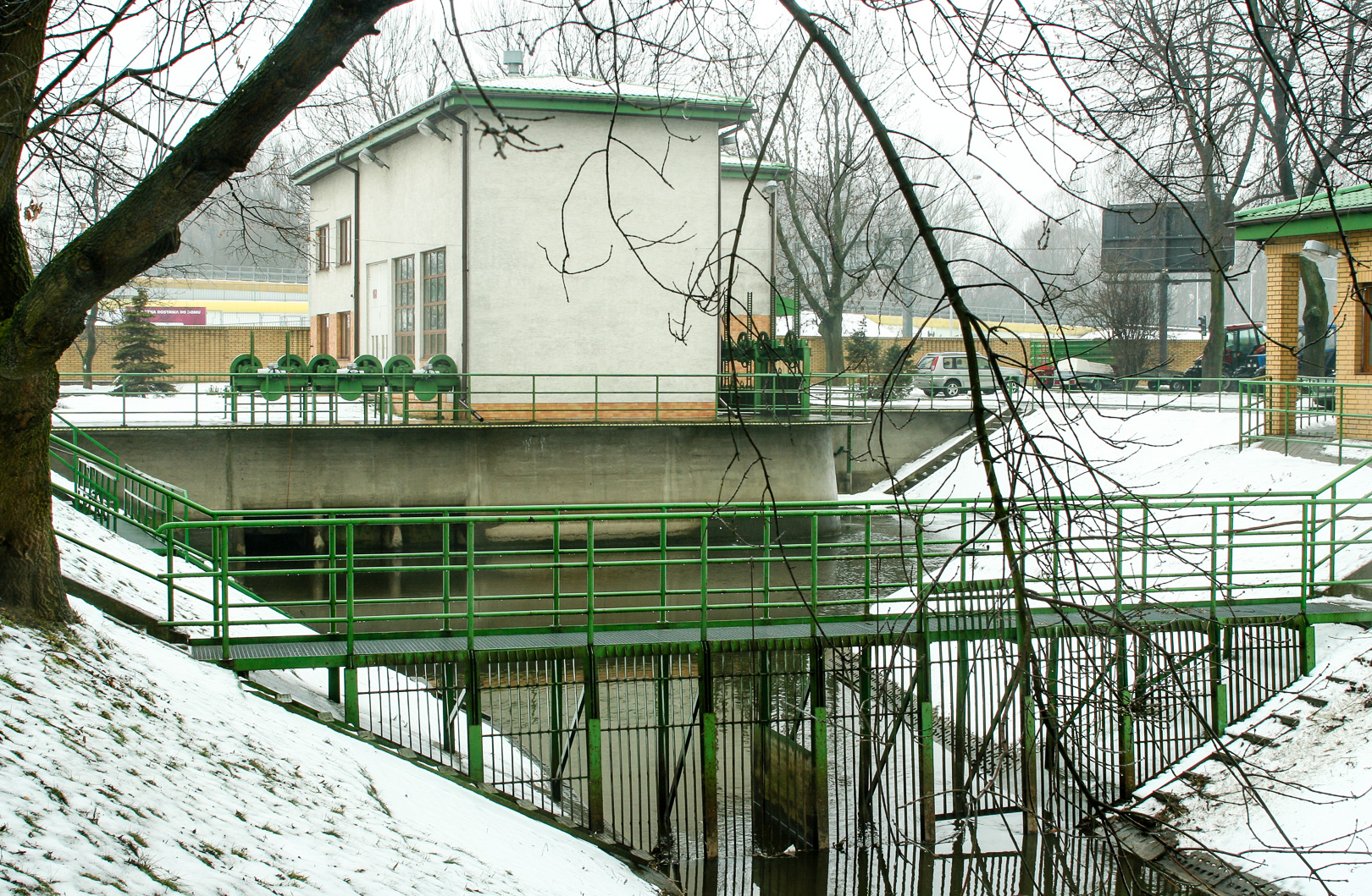 Pompownia (przepompownia) Bluszcze w Wraszawie. Na pierwszym planie Kanał Nowa Ulga.